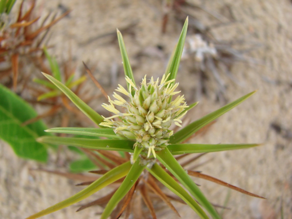 Ipomoea imperati - CONVOLVULACEAE Barra de Ibiraquera - Garopaba - SC - Brasil